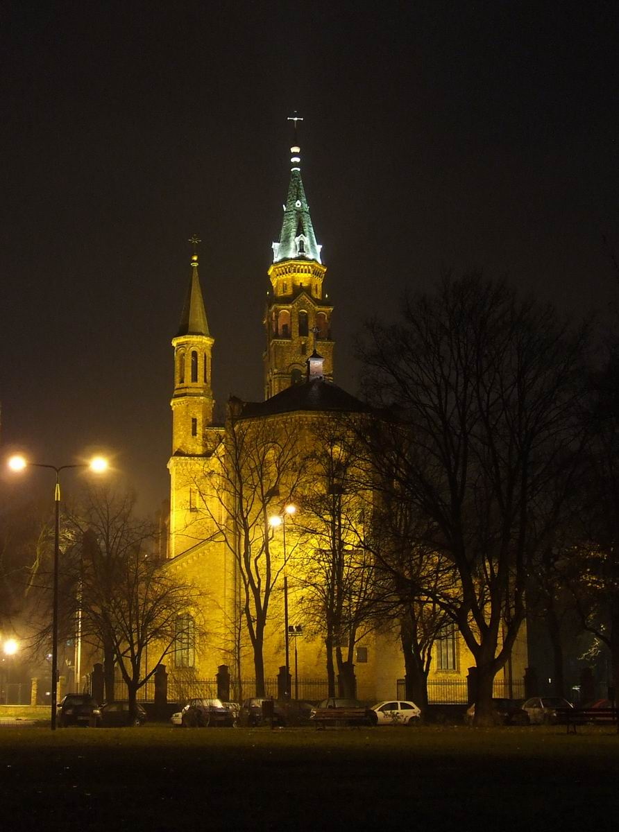 Kościół św. Augustyna w Warszawie